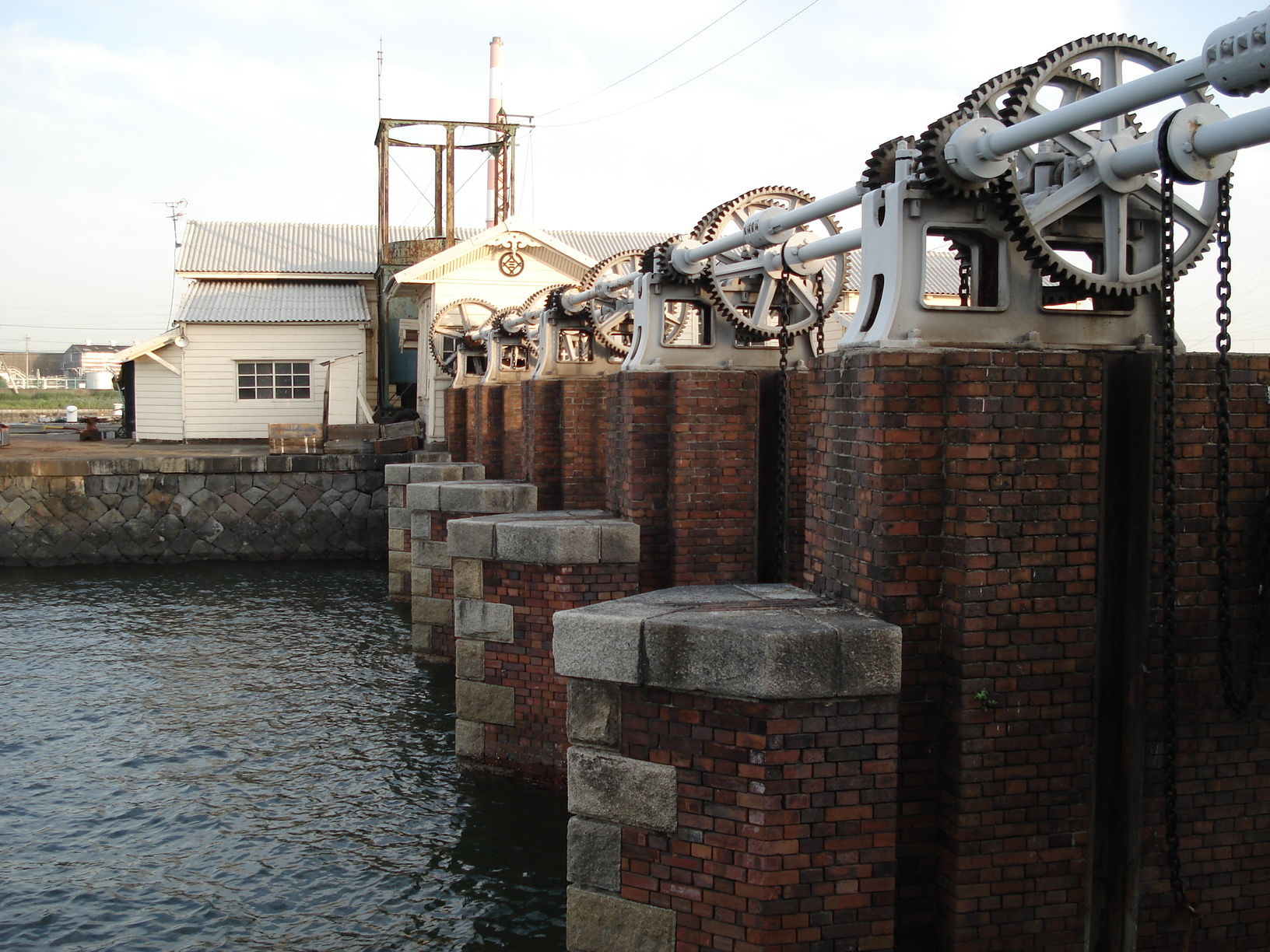 三池港の閘門の両脇に設けられているスルースゲート。満潮時に大型船が船渠に侵入する際に、潮を逃がして入りやすくする仕組み。れんが積みに配された石材が美しい景色を作り出している。